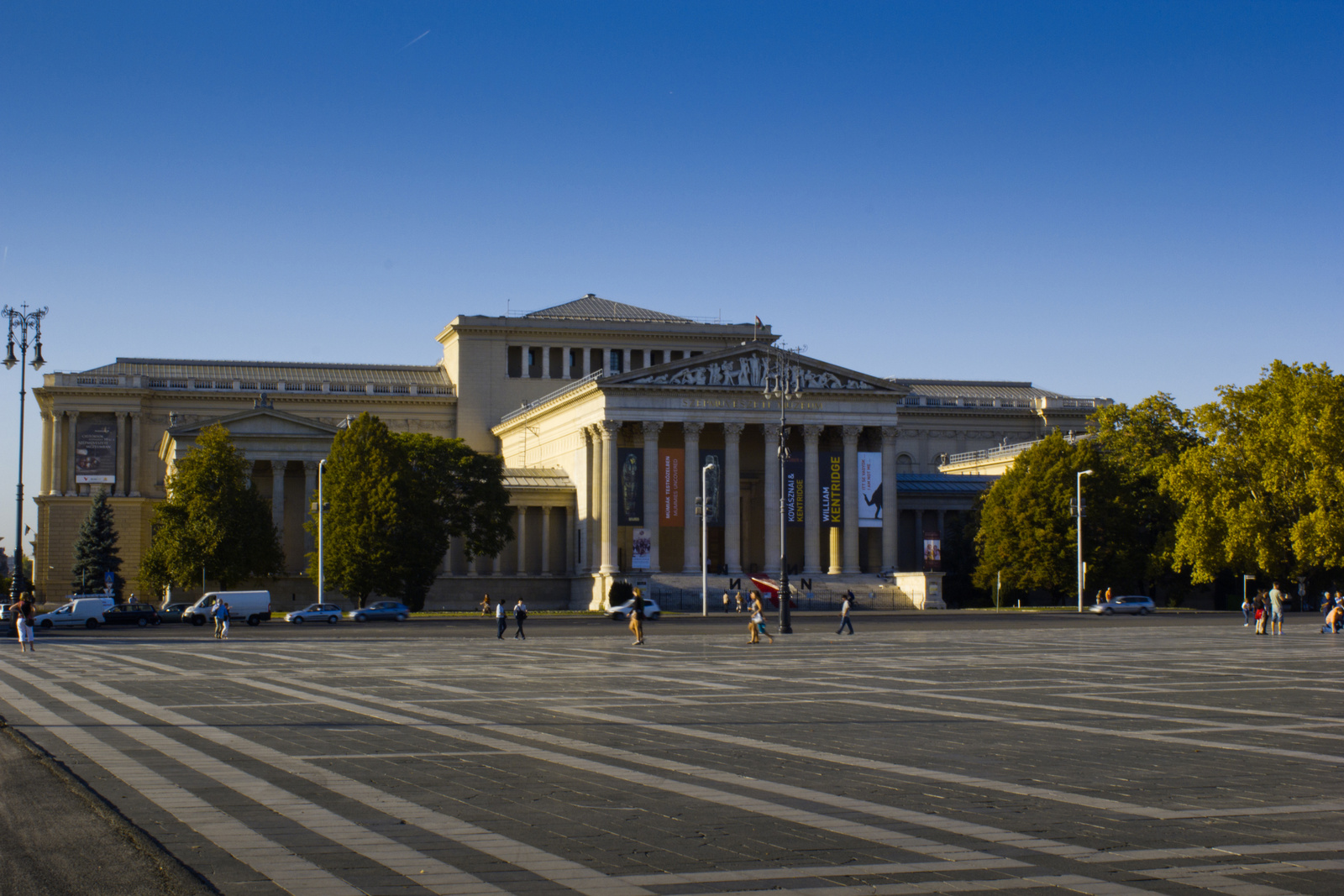 Szépművészeti Múzeum (Budapest 14, Hősök tere, Dózsa György út 39-41., Állatkerti út) This is a photo of a monument in Hungary, Identifier: 1226